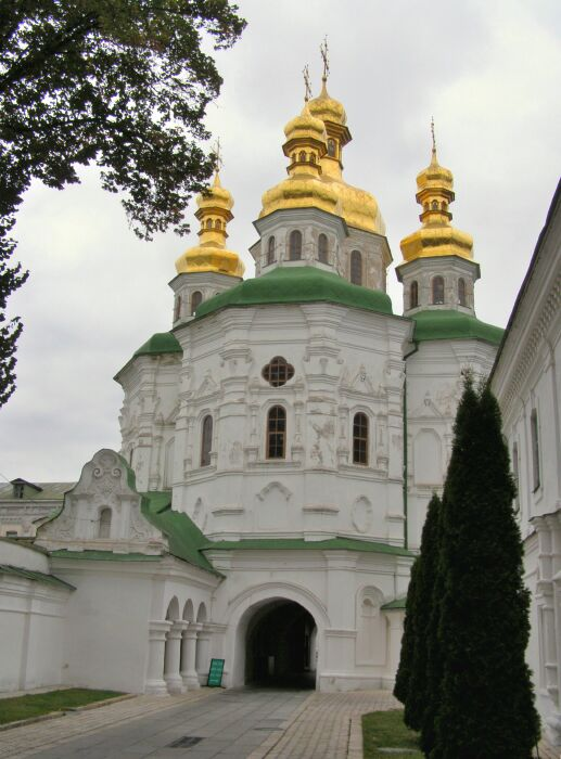 Церква Всіх Святих: Церква Всіх Святих у Києво-Печерській лаврі